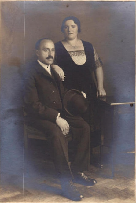 Robert und Ernestine Auer